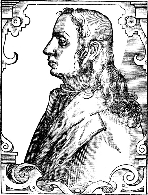 Incisione da Giovio, Paolo: Elogia virorum literis illustrium. - Basel, 1577.